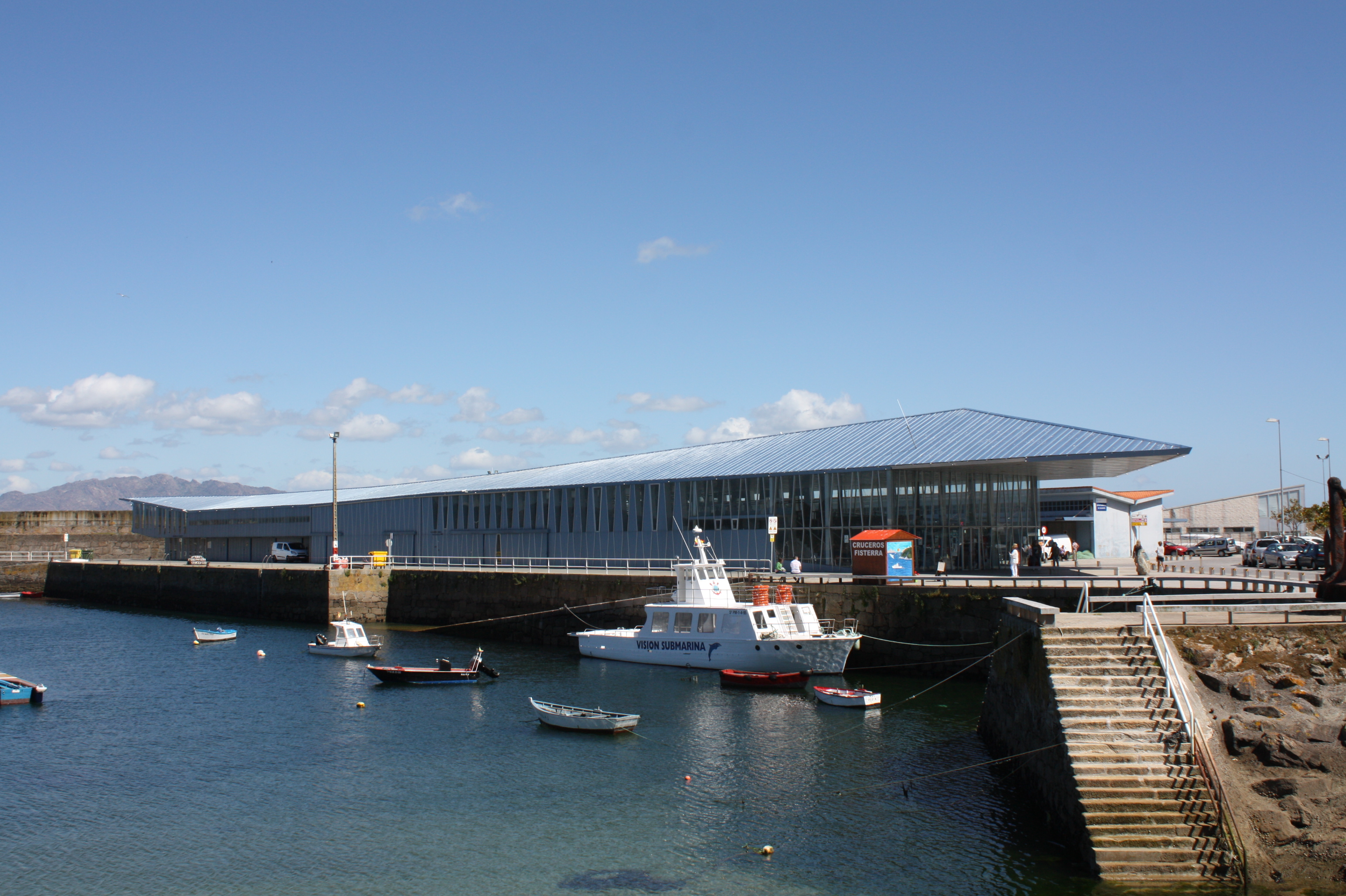 Lonxa de Fisterra (A Coruña)